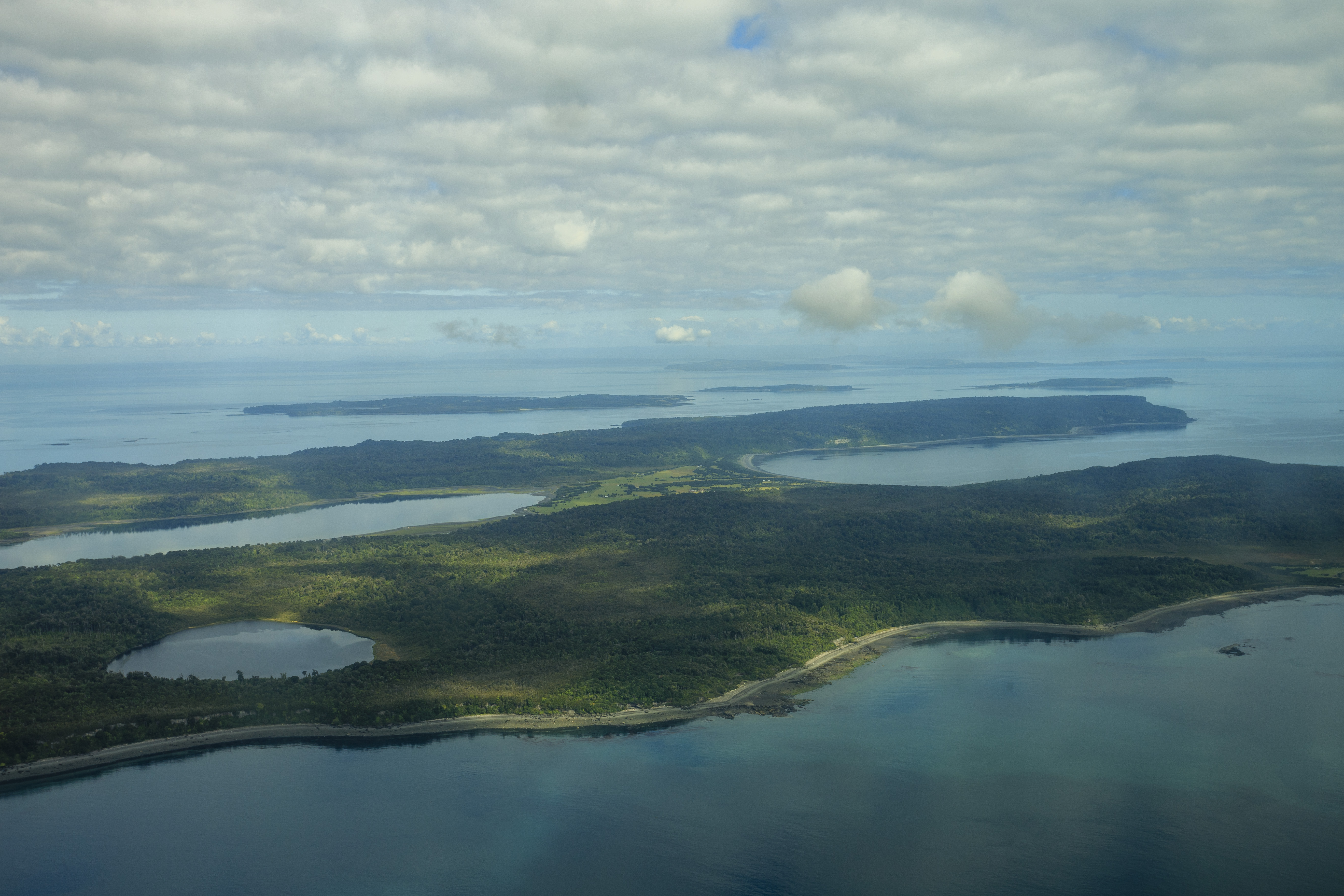 Isla Talcán, grupo Desertores, mar interior de Chiloé.